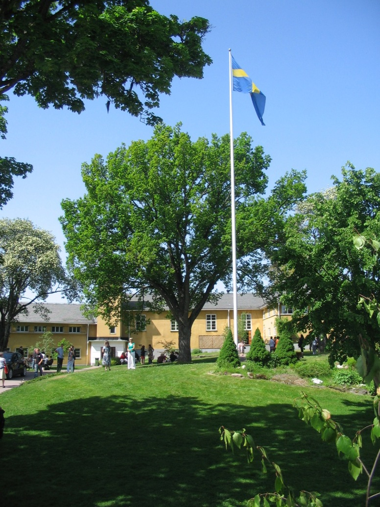 Avslutning på Molkoms folkhögskola; maj 2008